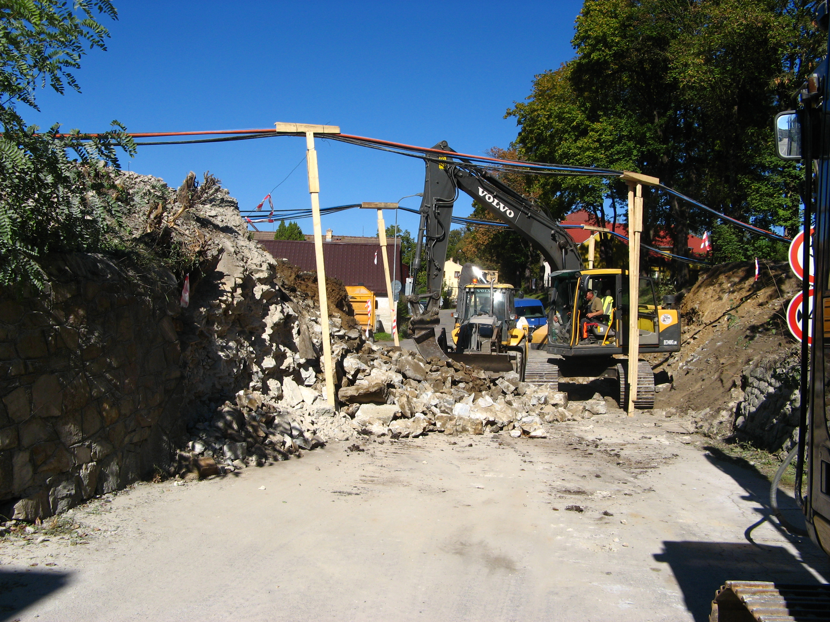 Demolice železničního mostu přes silnici v Boršově nad Vltavou (trať 194)